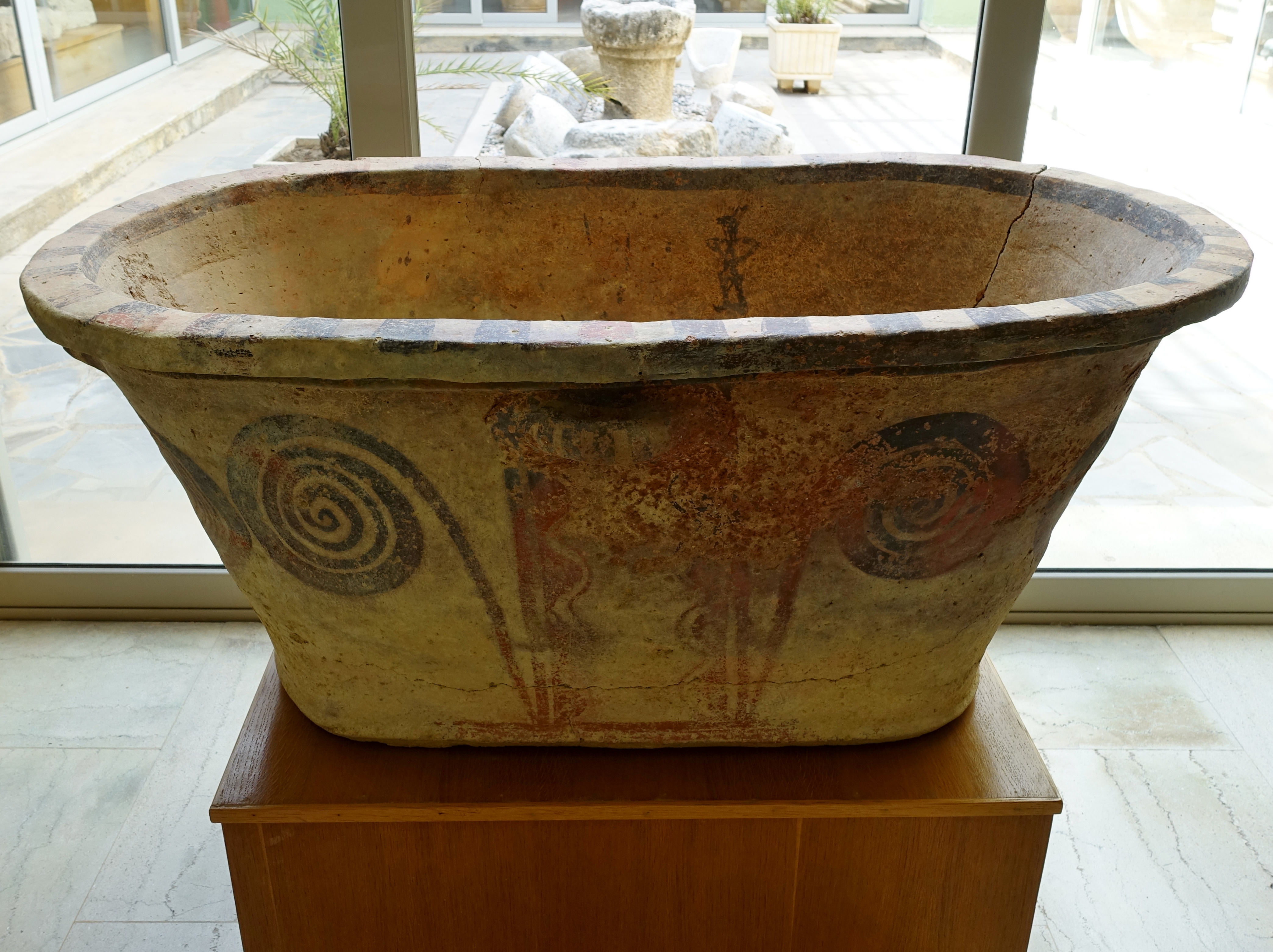 Tonsarg (Larnax) im Archäologisches Museum von Sitia, Kreta, Griechenland